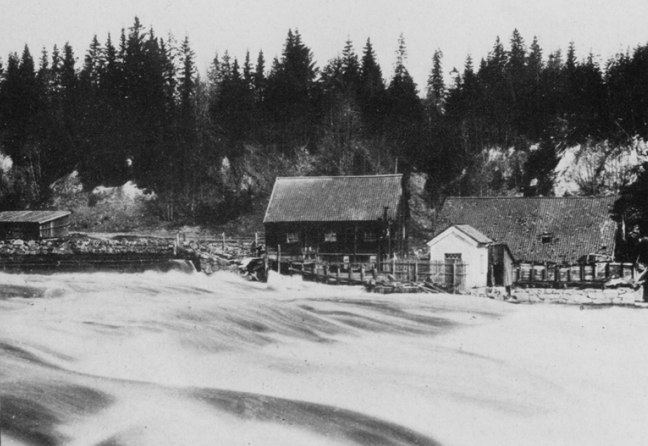 Månsbo smedja. Gammalt foto taget på 1800-talet.